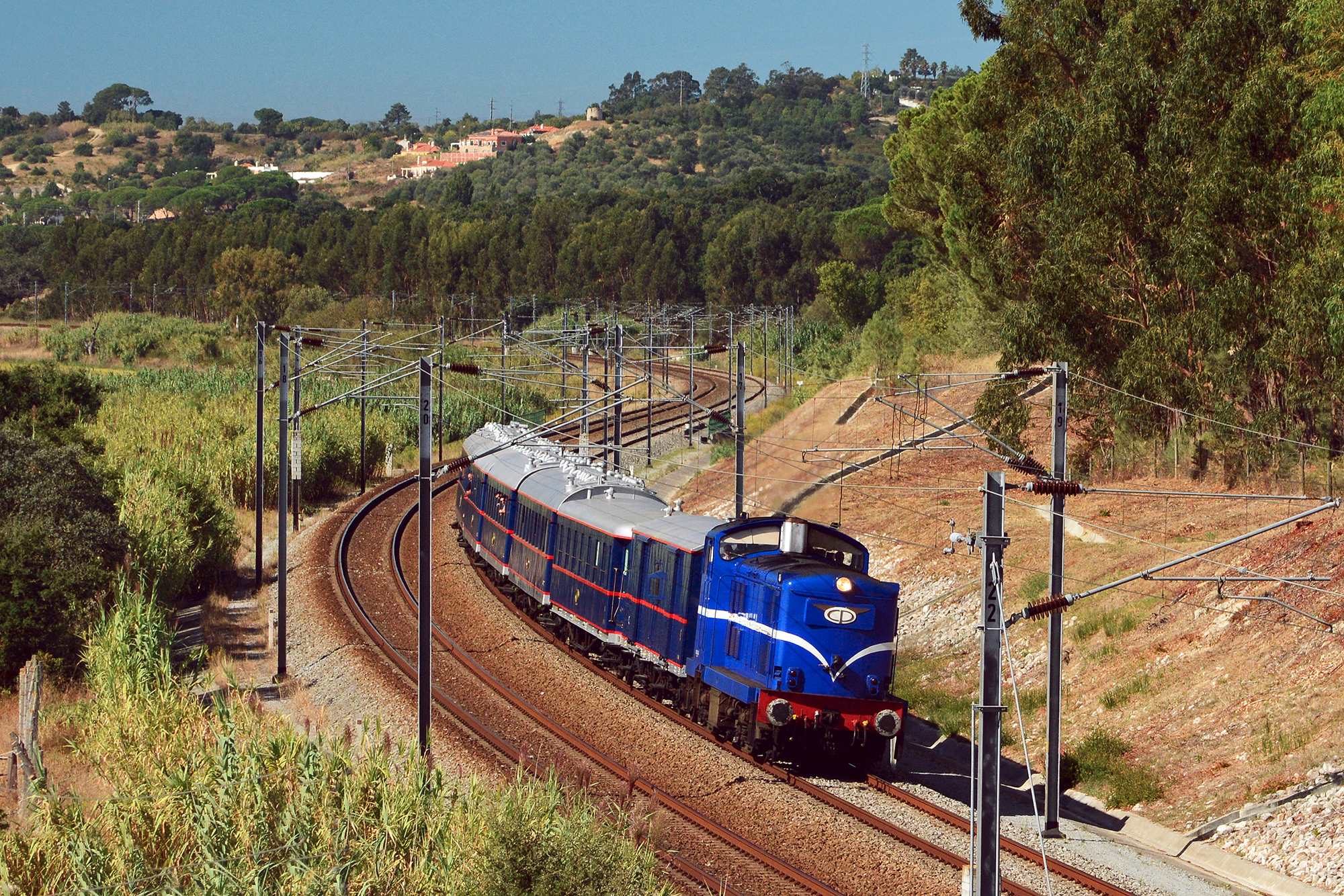 CPO 1424